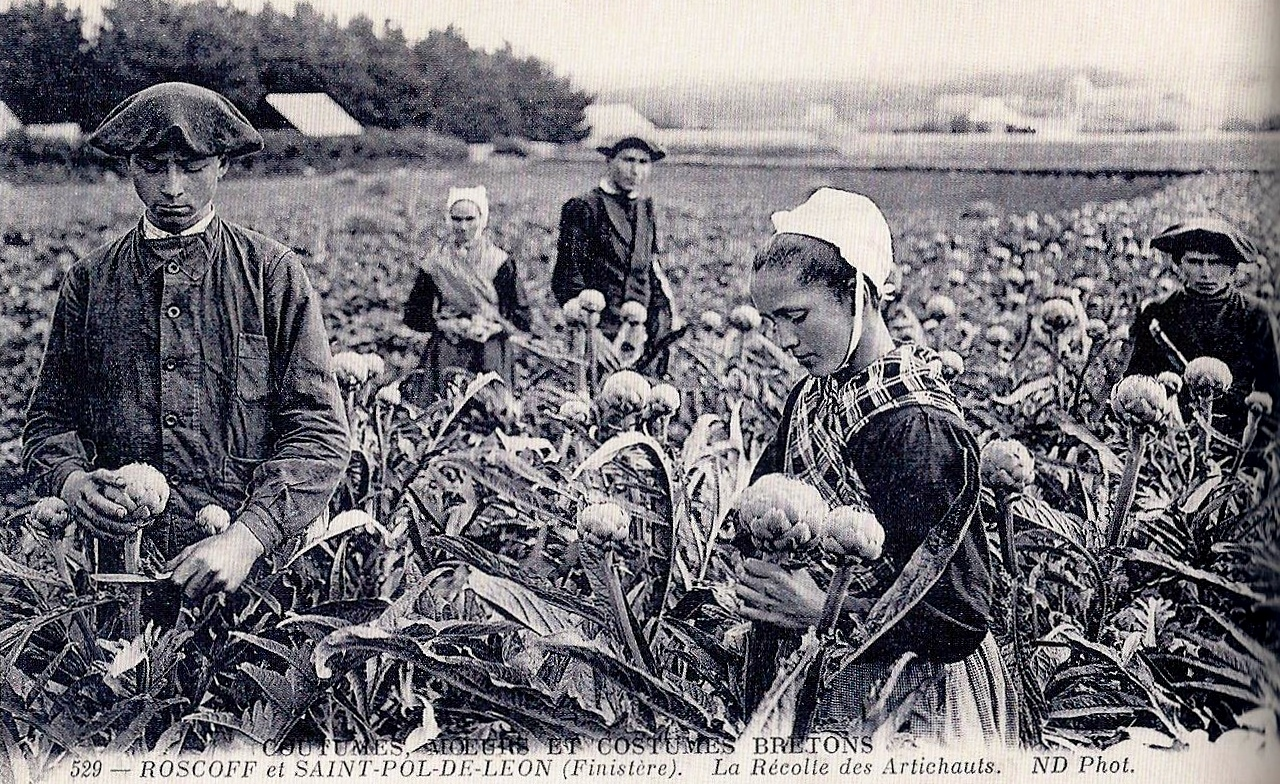 La récolte des artichauts dans la région de Saint-Pol-de-Léon et Roscoff (carte postale ND Photo, vers 1910).